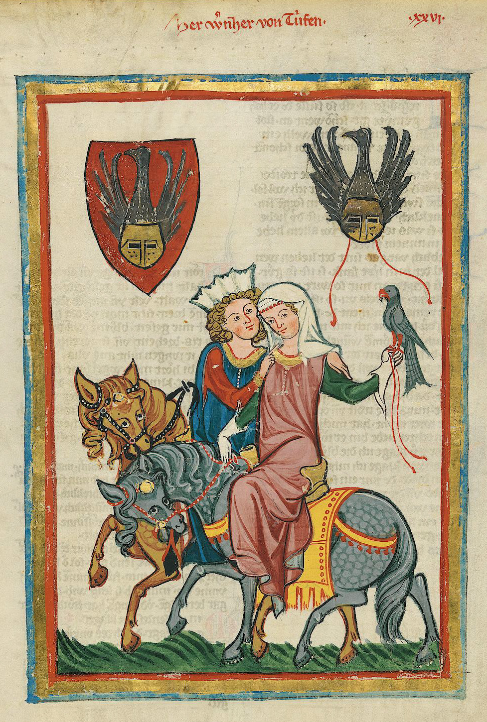 Codex Manesse, UB Heidelberg, Cod. Pal. germ. 848, fol. 69r, Herr Werner von Teufen